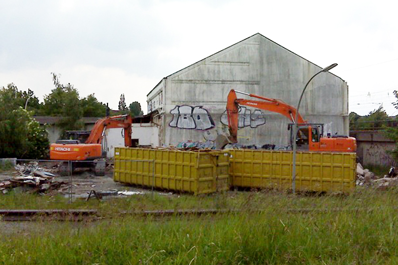 Bagger reißen die letzten Reste des Veddel Ballsaales im Mai 2009 ab.